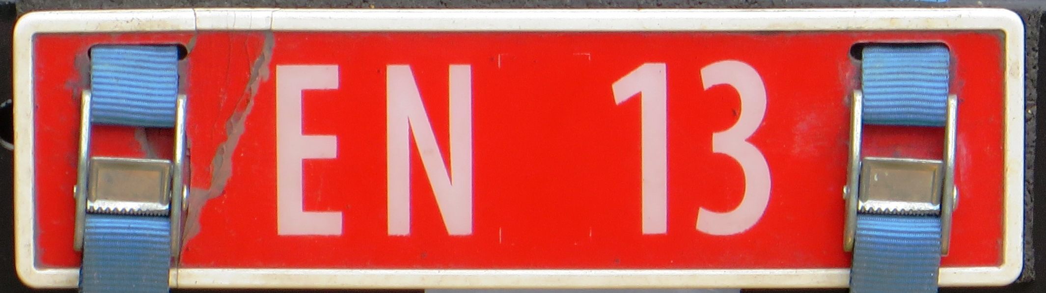 Handelaarskentekenplaat Noorwegen